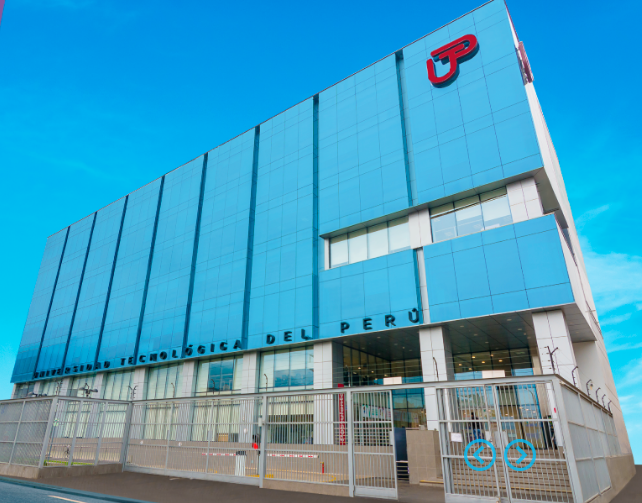 bonito